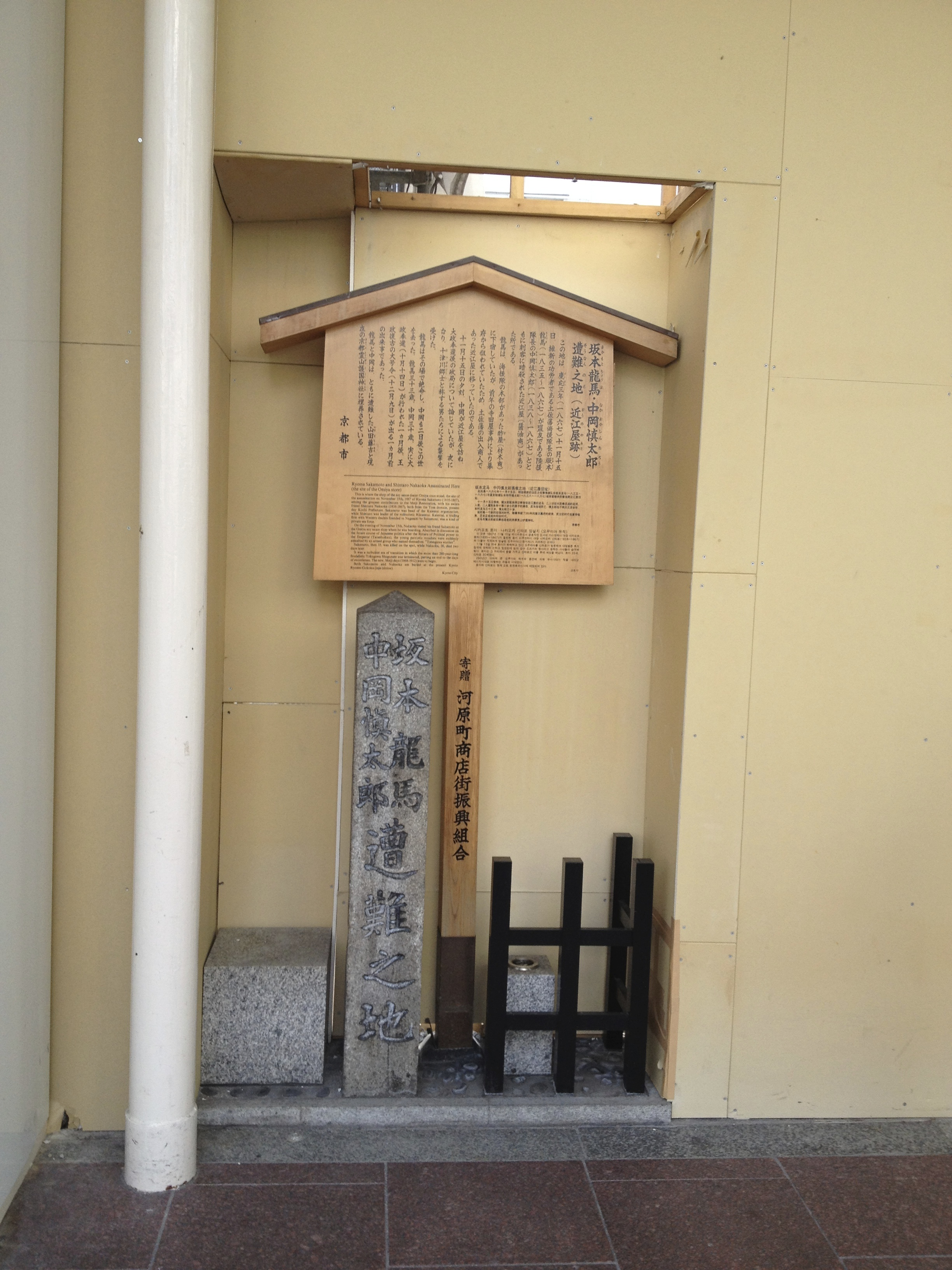 坂本龍馬と中岡慎太郎が暗殺された近江屋跡地。